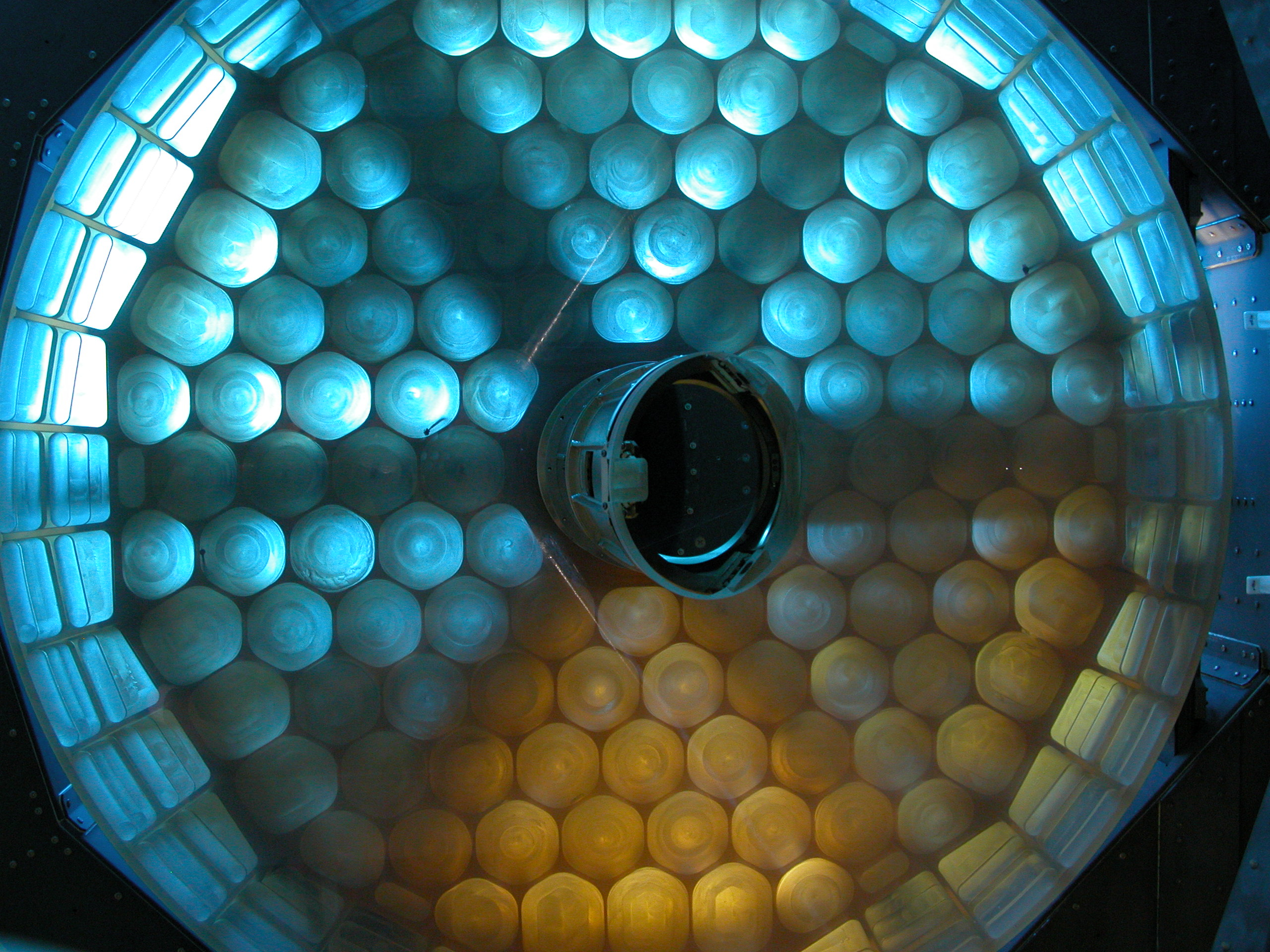 SOFIA Teleskop, Das Bild zeigt den Spiegel des SOFIA-Projektes vor der Beschichtung, man erkennt schön die Wabenstruktur des Spiegels, die der Gewichtsreduzierung dient.